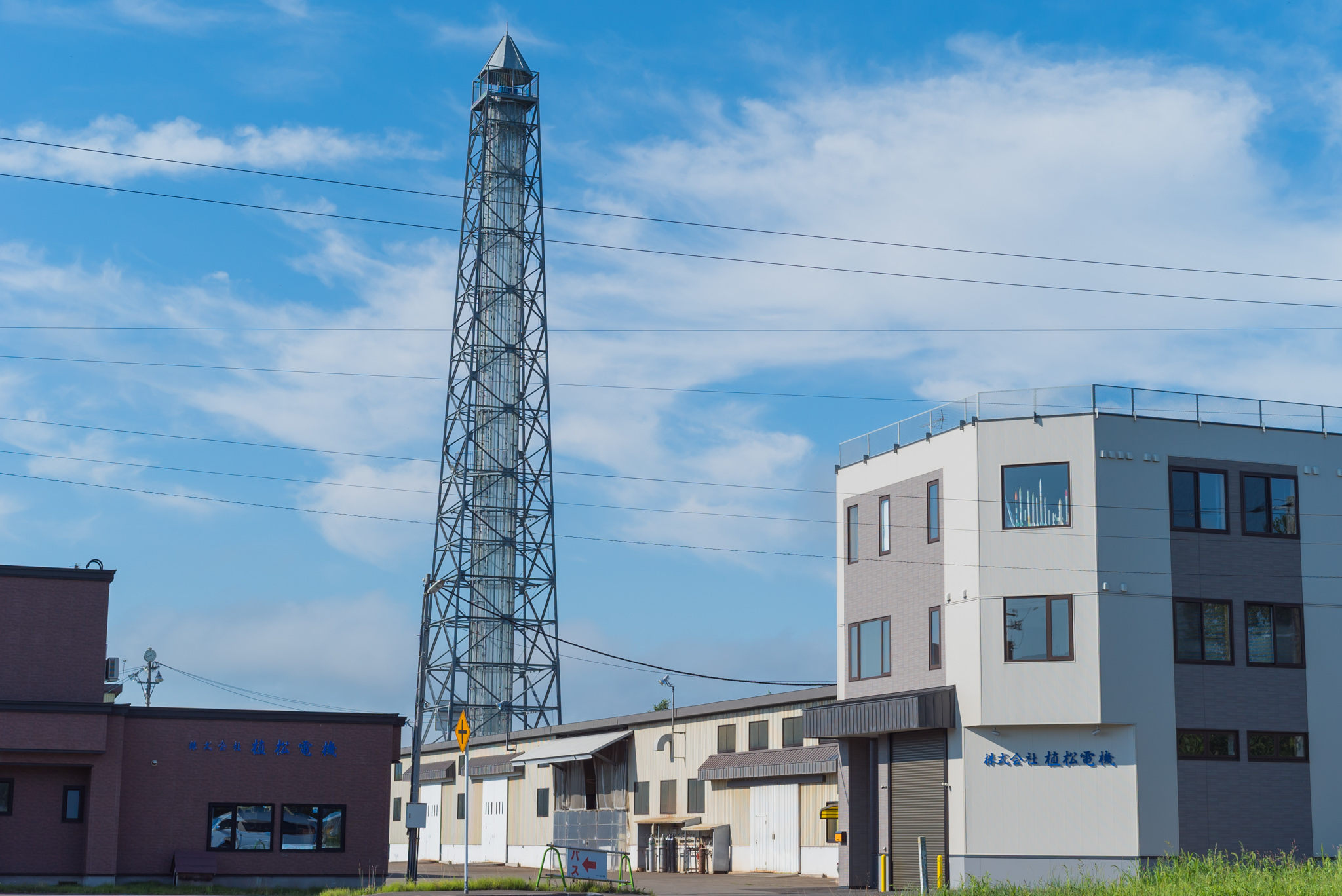 駐車場から見た新事務所(右)、コスモトーレ(奥の塔)